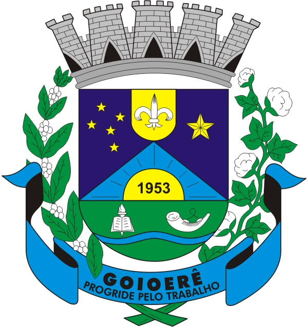 Brasão do município de Goioerê